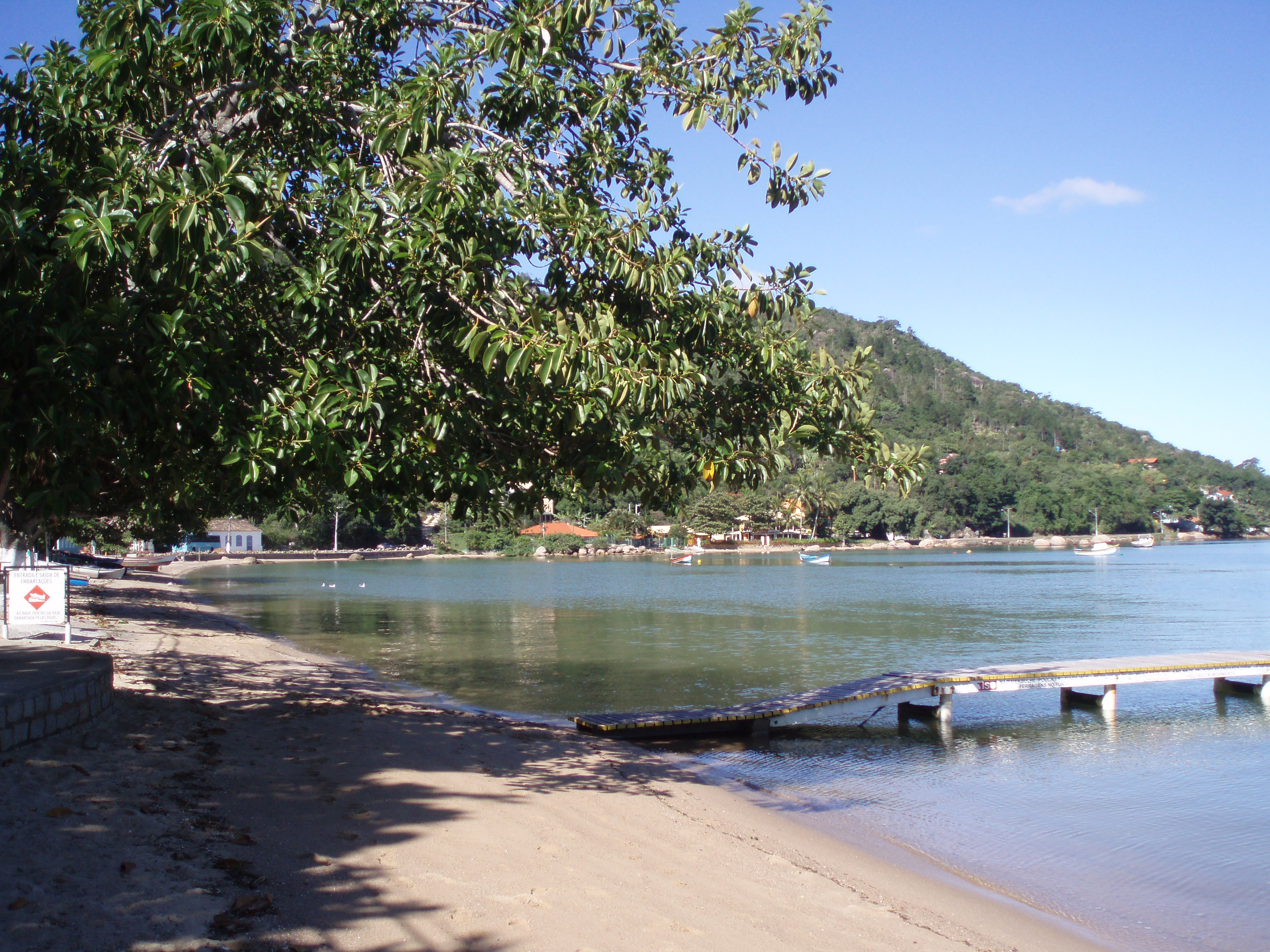 Vue d'une portion de la plage de Sambaqui, Florianópolis, Brésil